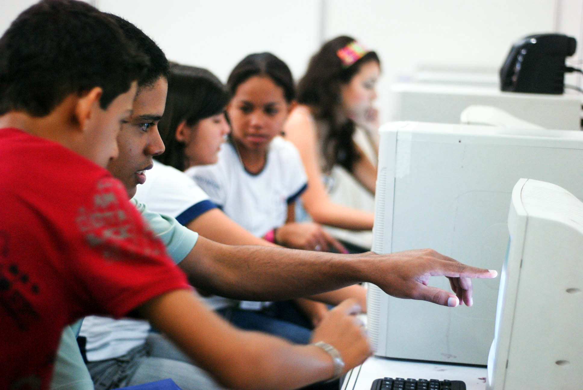 Aulas de robótica e programação pra alunos do ensino público de Goiânia e região.